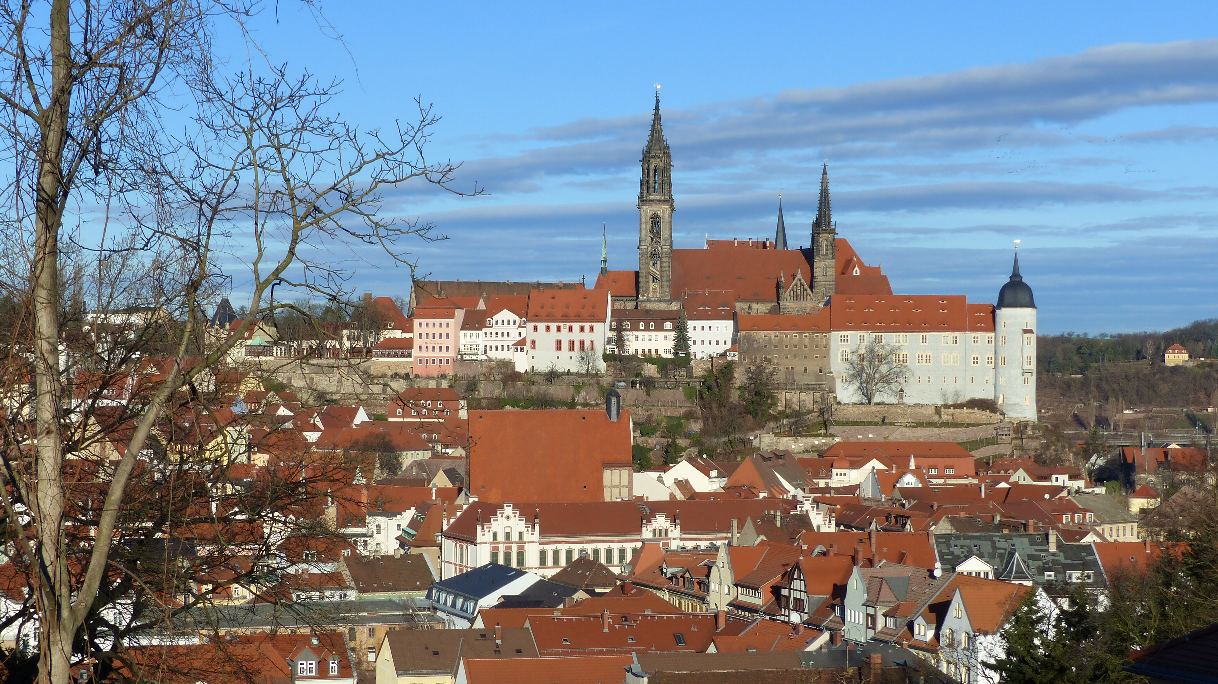 Blick auf die Altstadt von Meißen und die Albrechtsburg von Süden aus